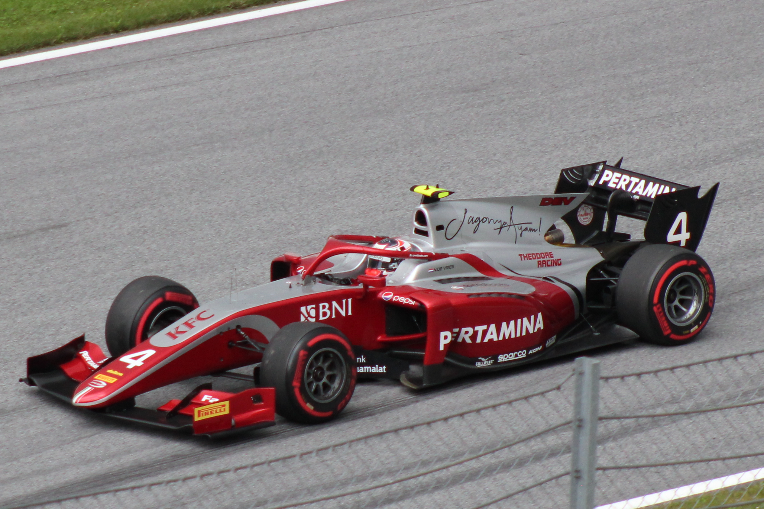 04 Nyck de Vries beim Rennwochenende in Österreich 2018 (3)